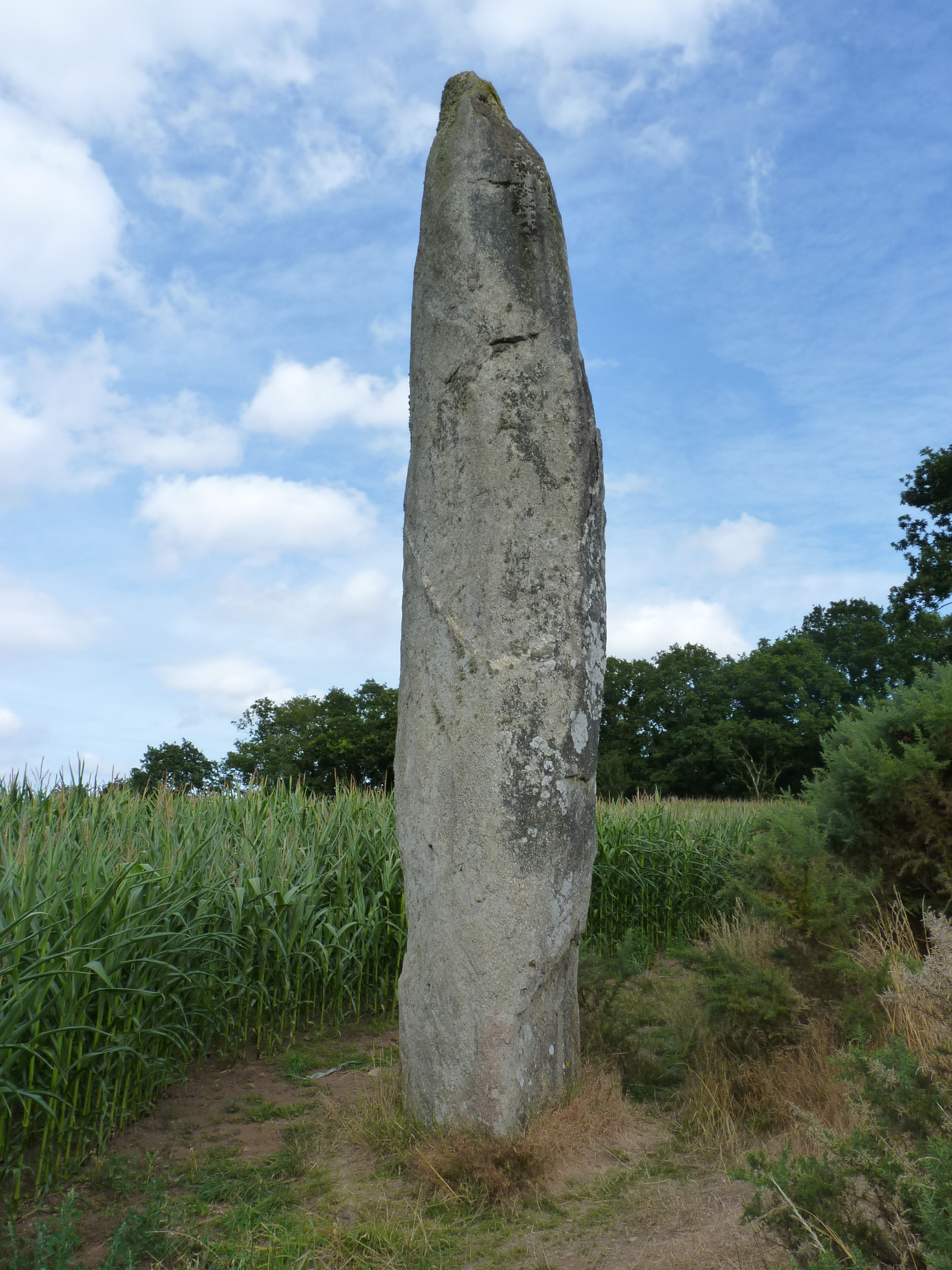 Menhir de 7m de hauteur